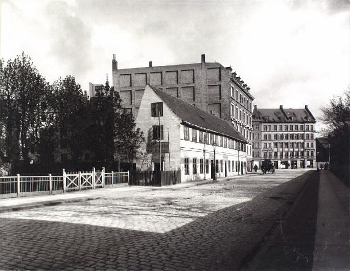 "Det skæve hus" på Kalkbrænderivej (nuværerende Randersgade) på Østerbro i København. Huset blev revet ned 1934.